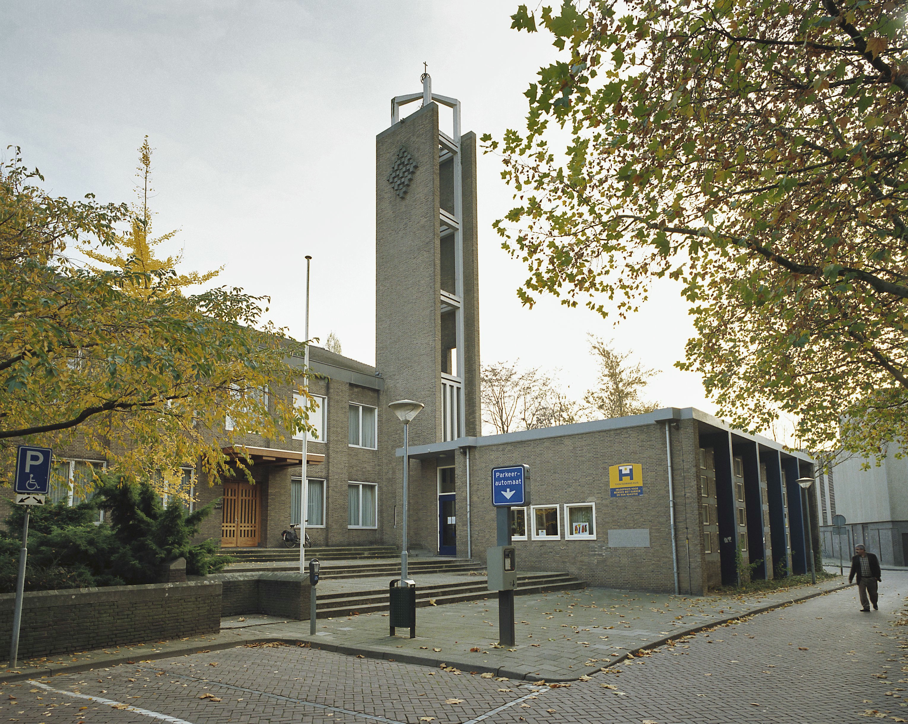 Klooster Mariaweide: Overzicht, aanzicht klooster vanuit het noord-westen